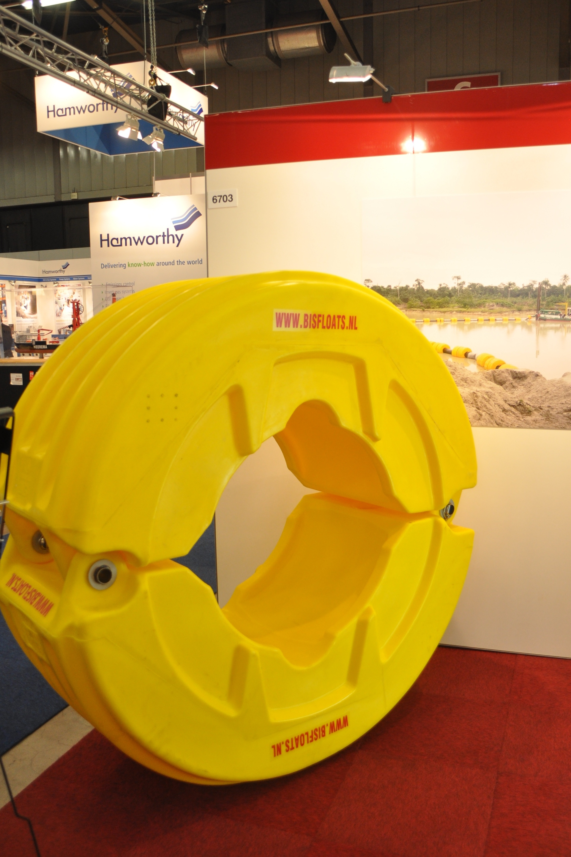 Equipment for the shipping industry